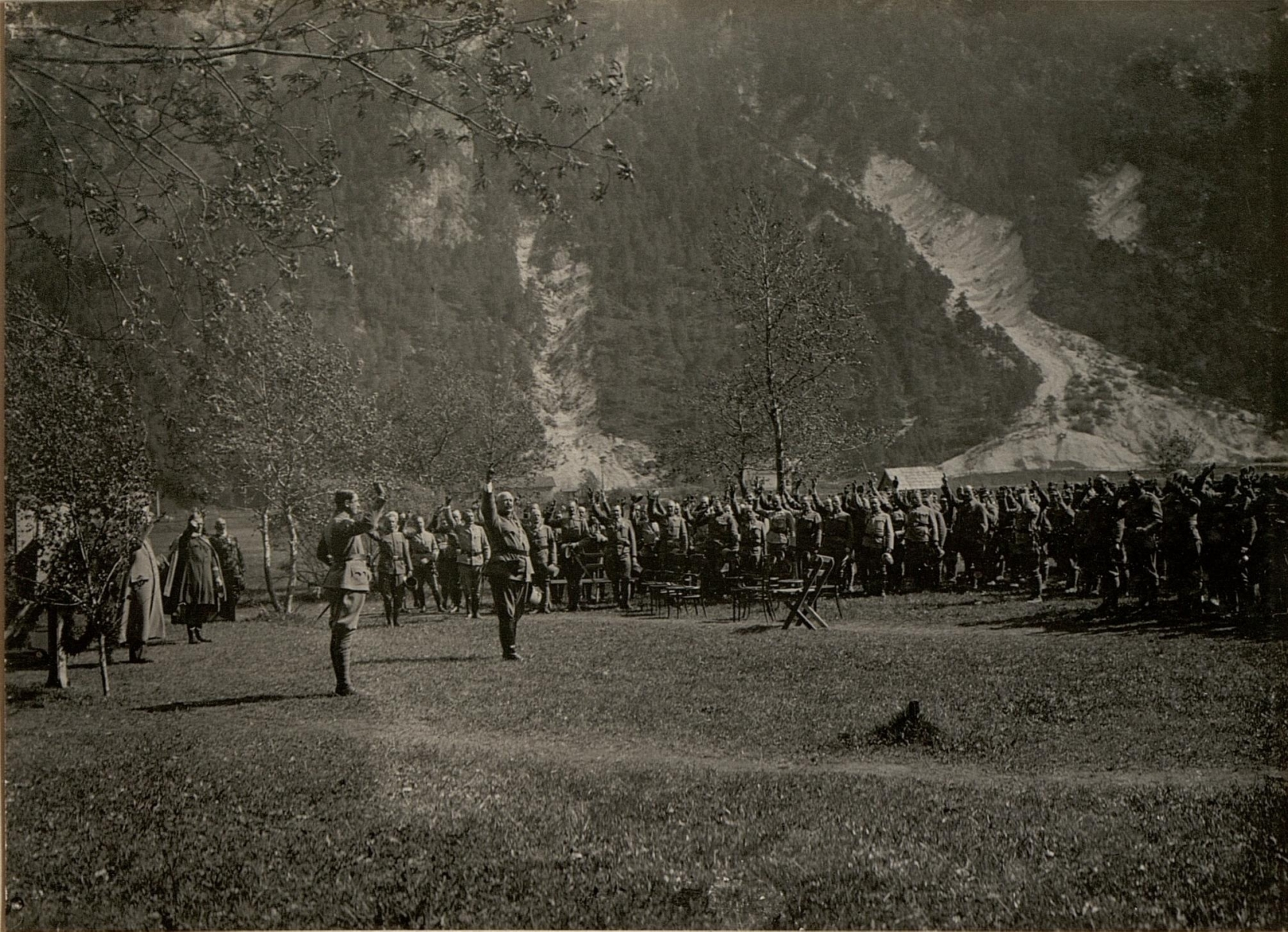 General der Kavallerie Franz Rohr von Denta anscheinend bei einer Eidleistung